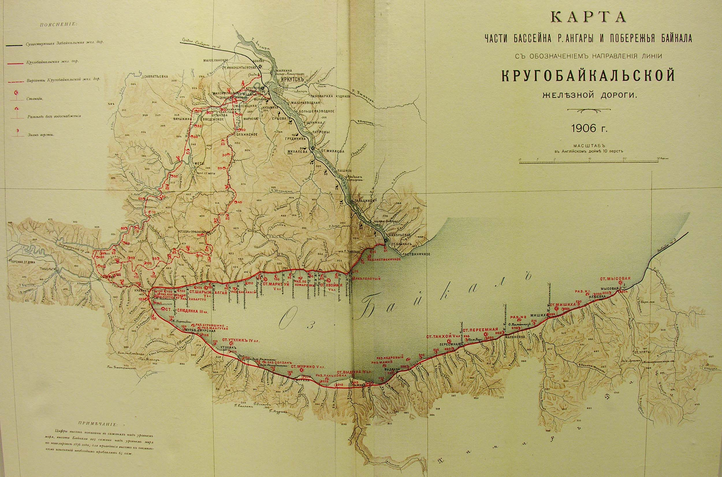 Репродукция старинной карты 1906 года